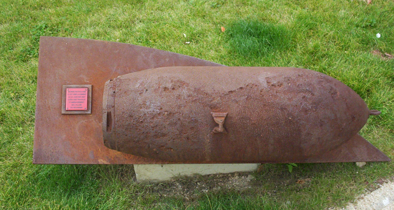 Bombe exposée à Bruz